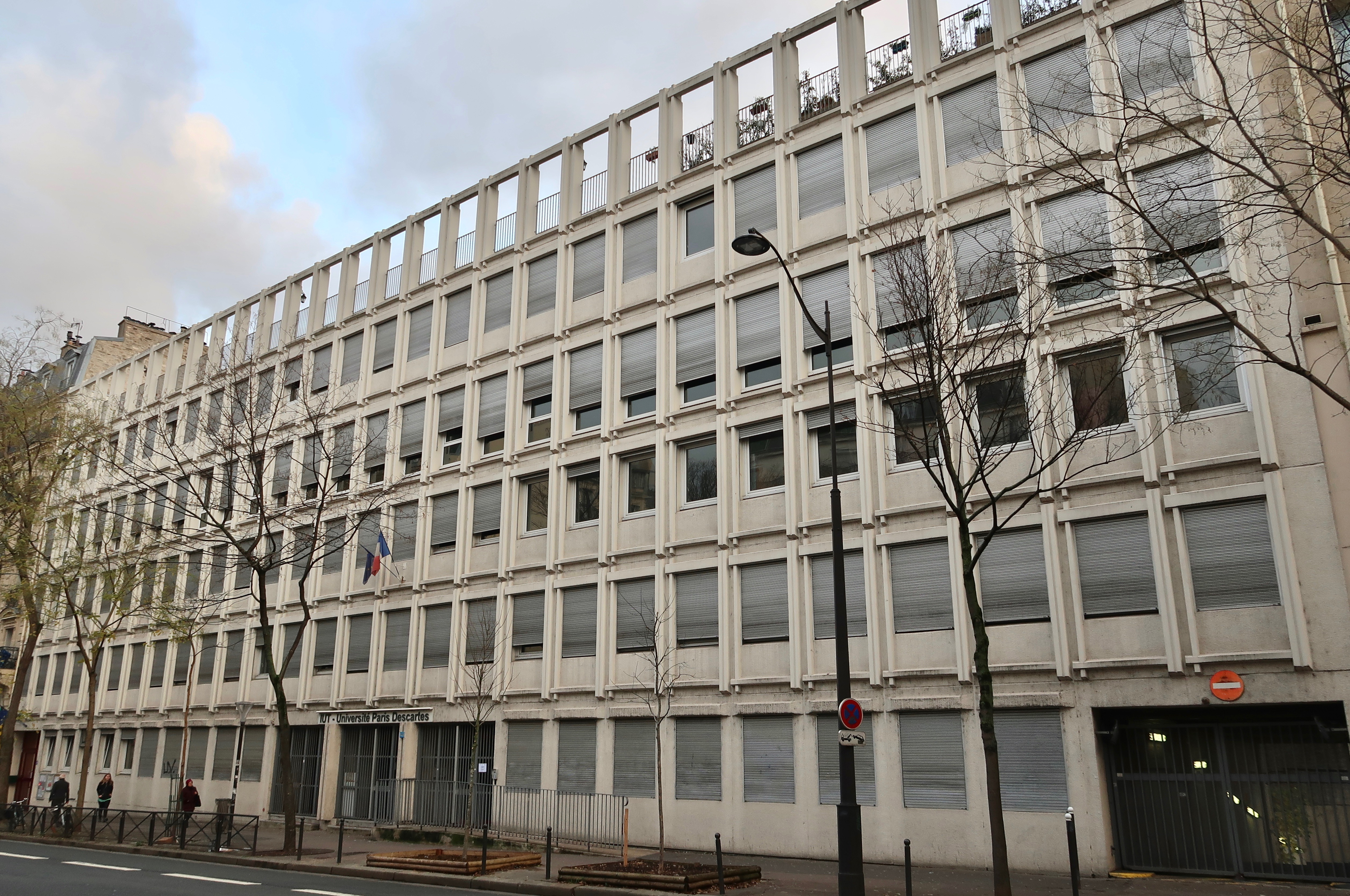 IUT de l'université Paris-Descartes, n°143 avenue de Versailles (Paris, 16e).